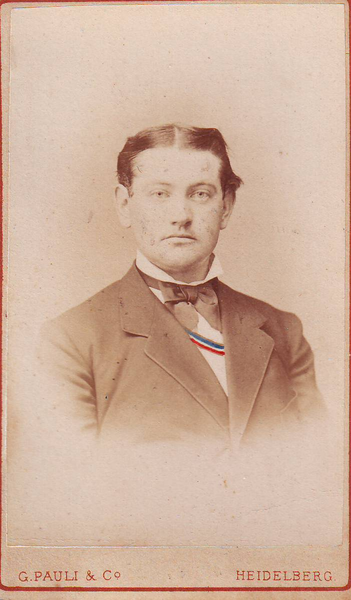 Ernst Himburg als Heidelberger Rhenane